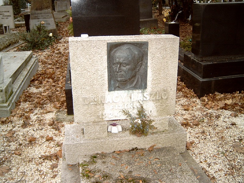 Nagy László (Bp., 1924. dec. 24. – Bp., 1970. jan. 11.): fizikus, a fizikai tudományok kandidátusa (1956) sírja Budapesten. Farkasréti temető: 6/1-1-30 [szobrász: Szabó István ifj.].